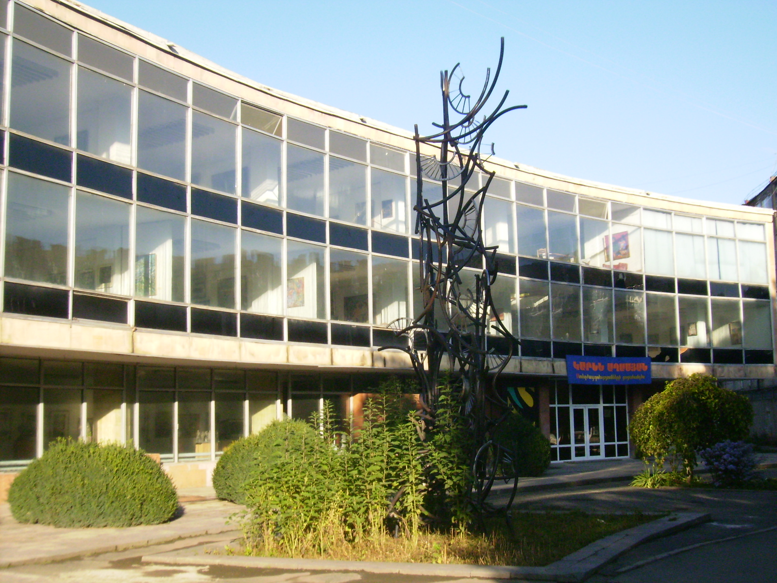 Վանաձորի պատկերասրահը 1/49